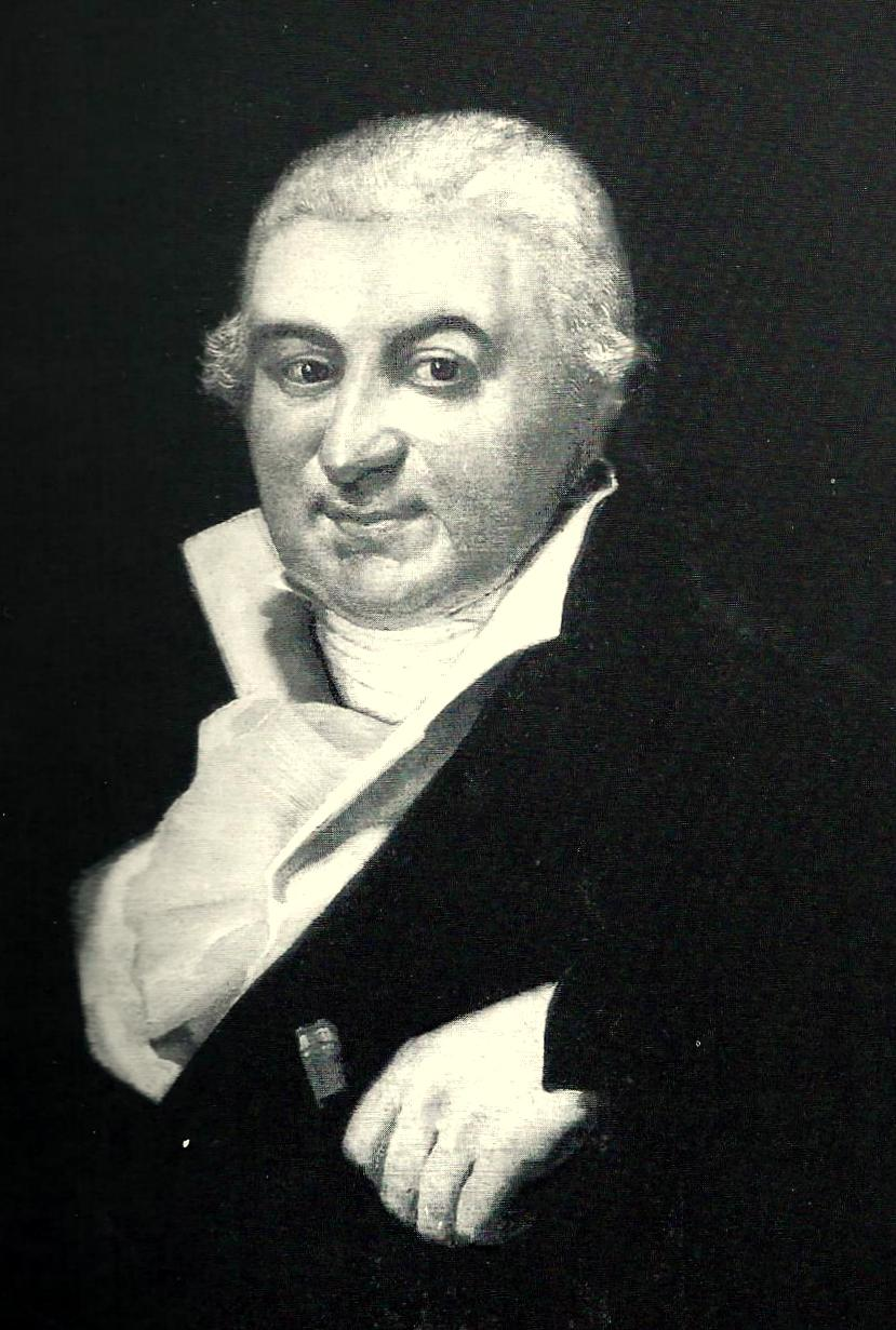 Gemälde-Porträt von Johann Friedrich Jacobi, (1765-1831), Tuchfabrikant in Aachen, Präfekturrat und Interrims-Präfekt im Département de la Roer sowie Mitglied im Corps Législatif.